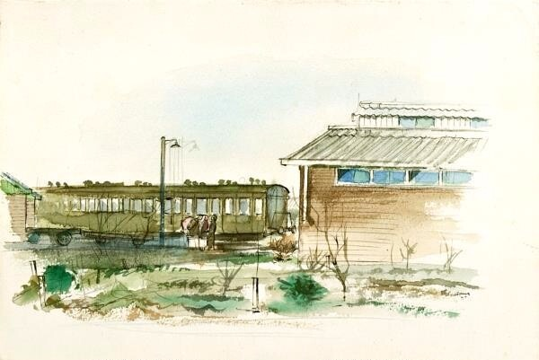 Links een treinwagon, rechts een gedeelte van het ketelhuis, voor de wagon staan drie personen met spullen.